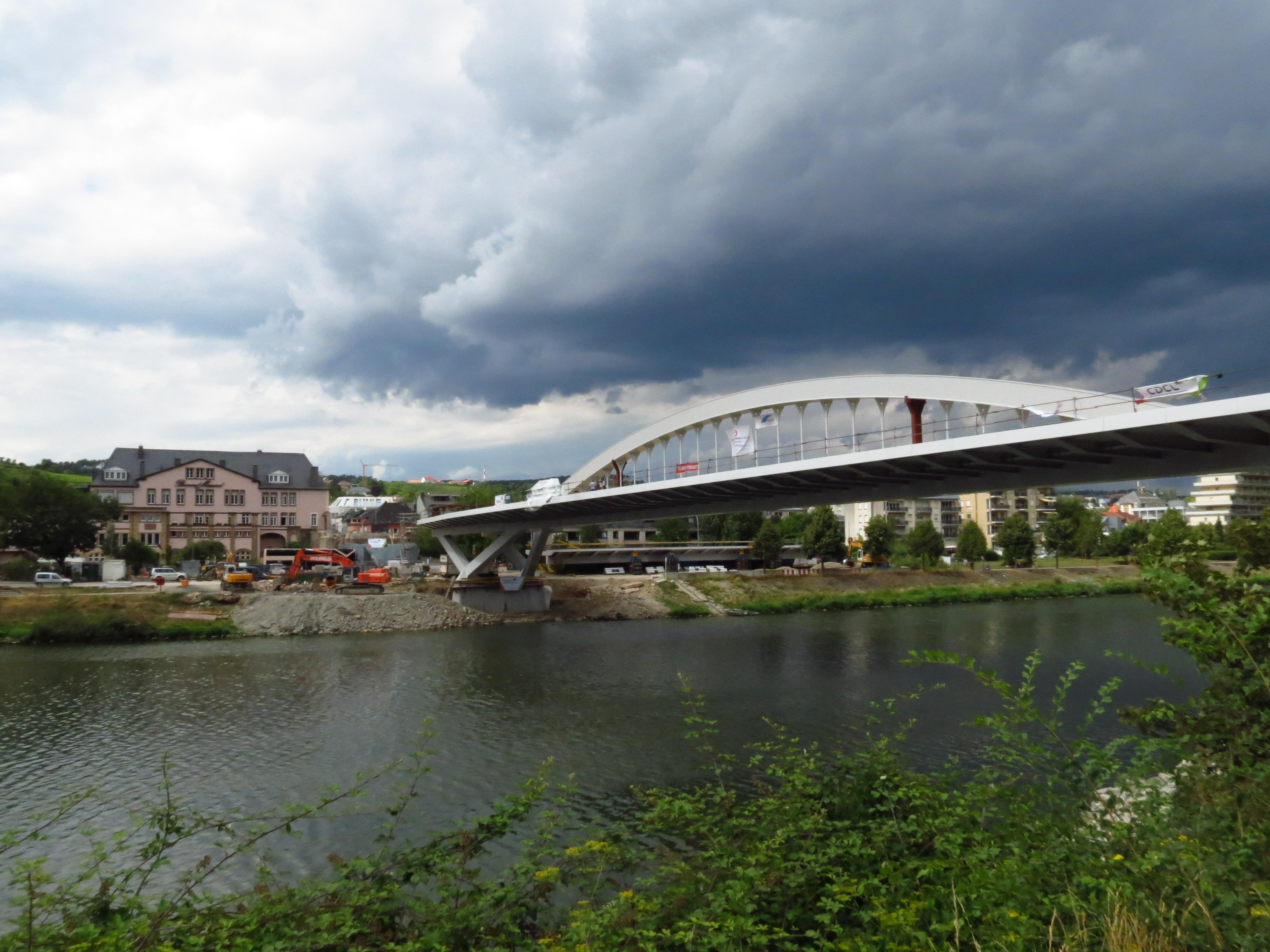 Grevenmacher (Luxemburg) mit neuer Moselbrücke.